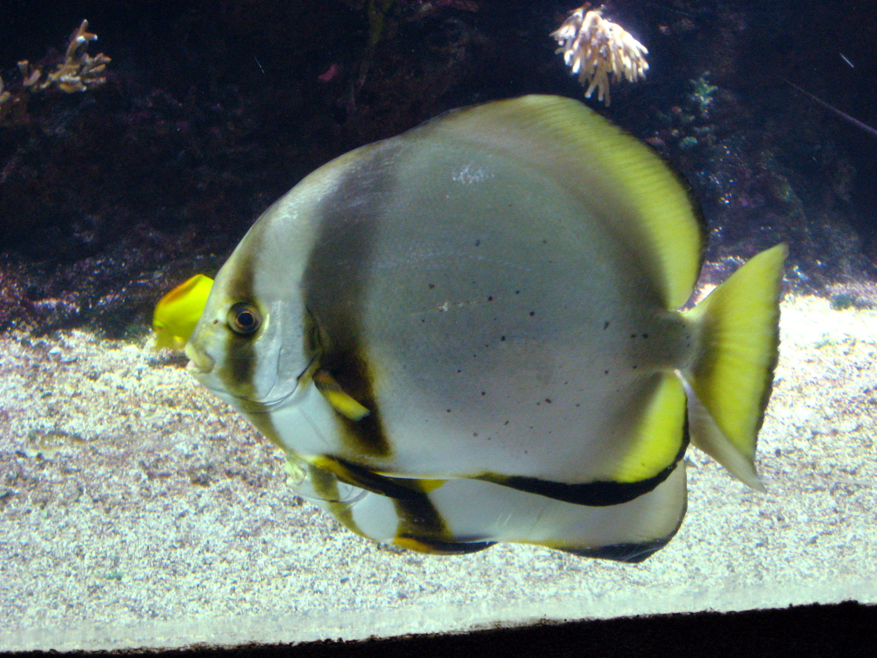 Platax pinnatus in Nausicaä Centre National de la Mer